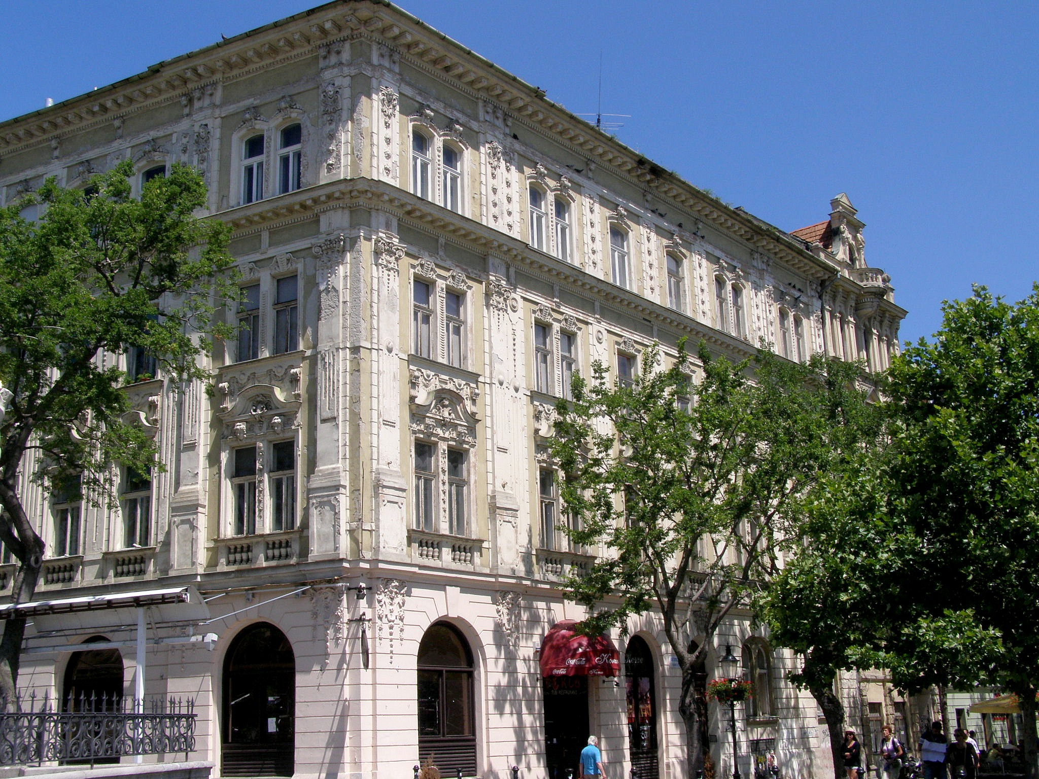 Hviezdoslavovo nám. č. 11 (Rybné nám.). Neskorobarokový nájomný dom, postavený v závere 18. storočia na mieste zrušenej priekopy mestského opevnenia a neskoršej obytnej stavby. V prízemí terajšieho domu fungovala kaviareň Viktoria, neskôr Korzo. Počas stavebných prác boli v podzemí objavené piliere a tehlové klenby mosta zo 17. storočia, ktorý preklenoval obrannú priekopu pred Vydrickou bránou